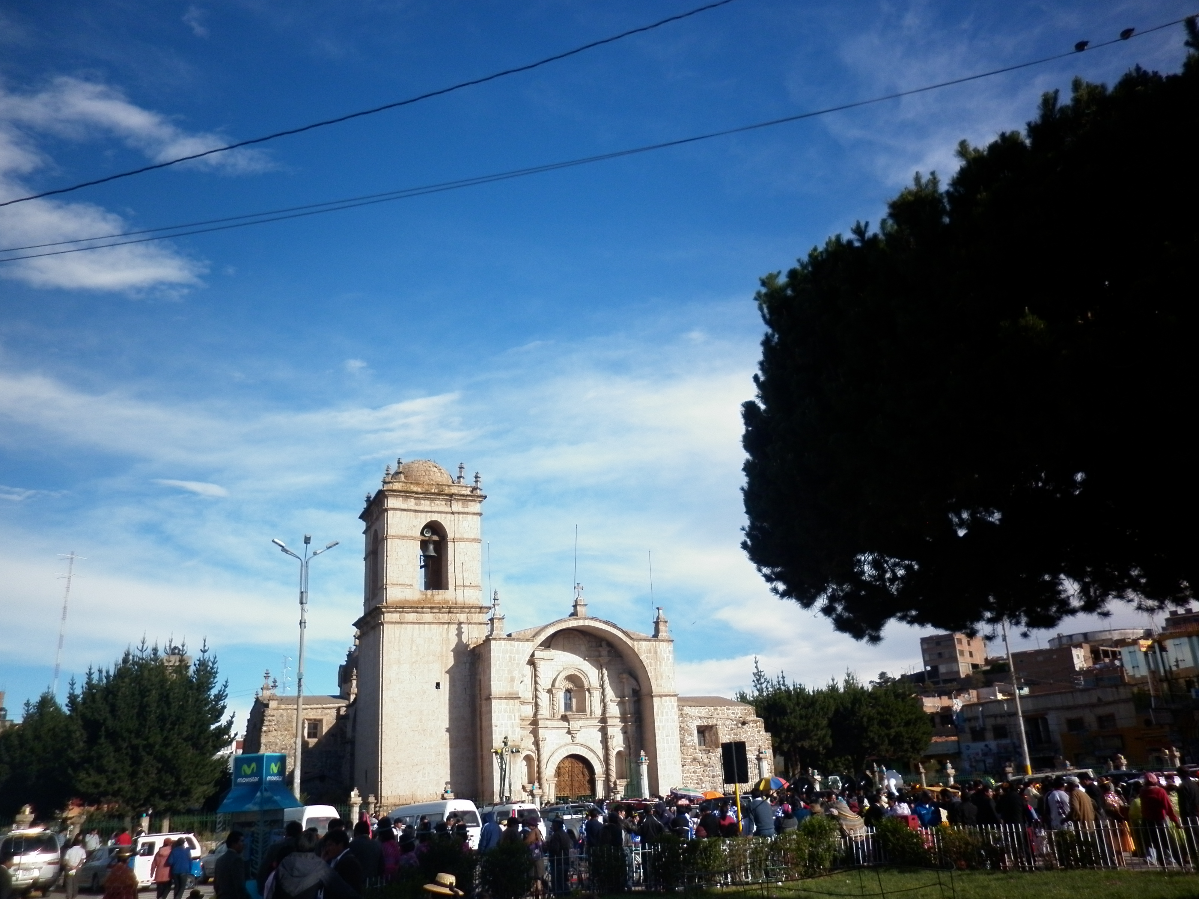 Plaza de Juliaca Runa Simi: Uj allin rikcha Hullaqa plasapi